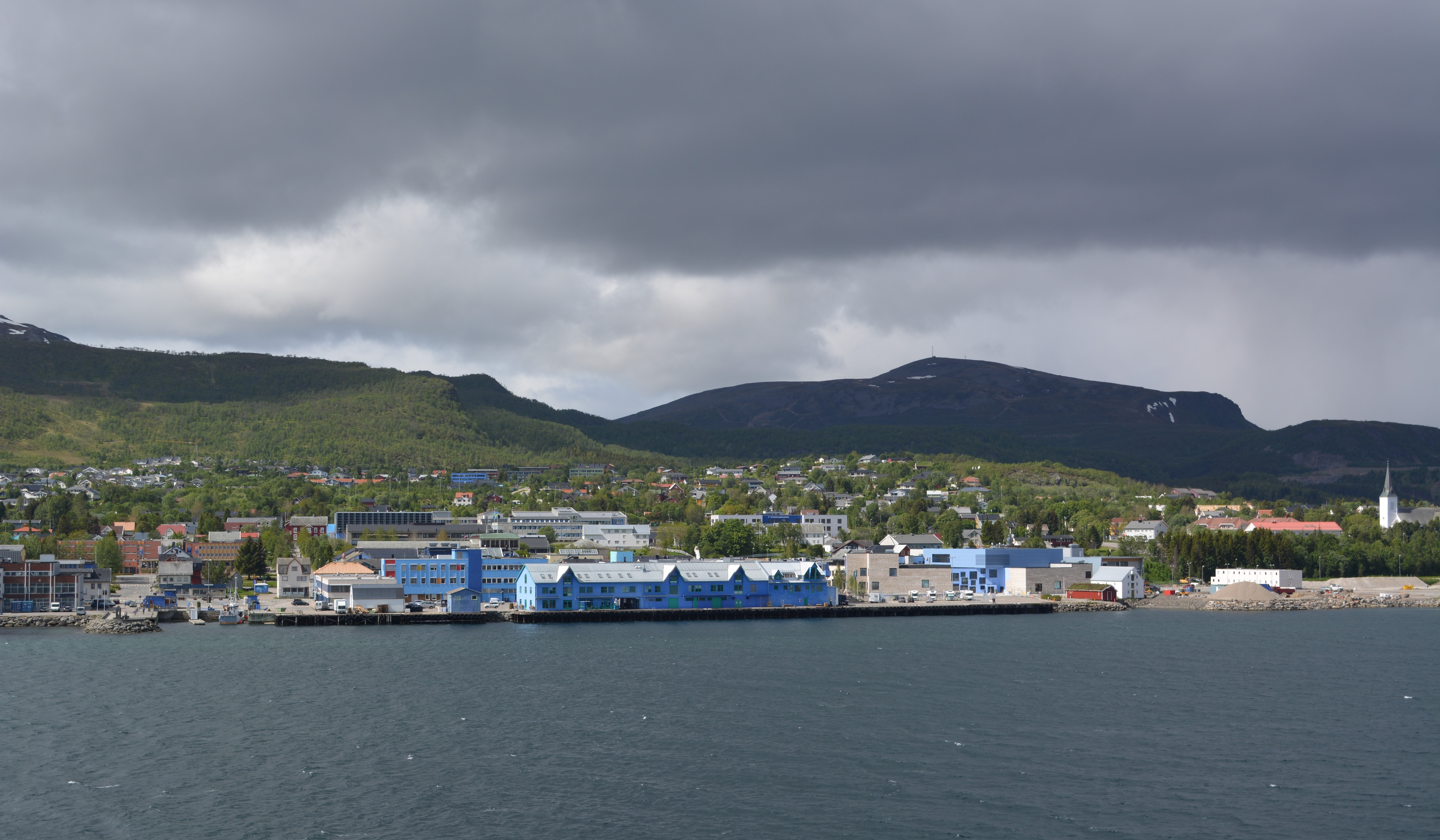 Blick auf die "blaue Stadt" Sortland vom Hurtigrutenschiff